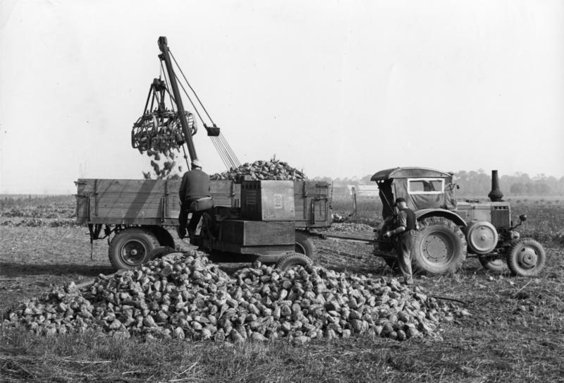 Rübenvollerntemaschine bei der Arbeit auf dem Dikopshof bei Sechtem, 9.10.57 Information added by Wikimedia users.